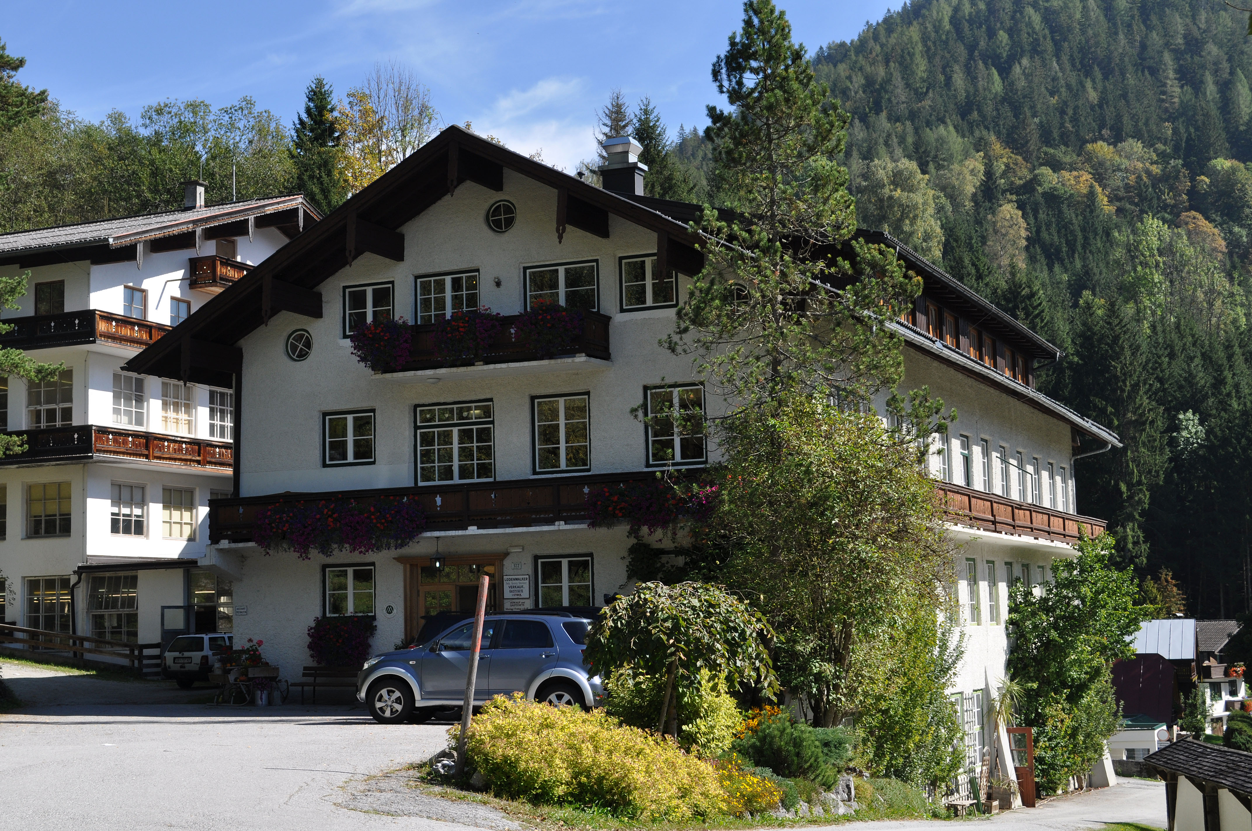 Lodenwalke Steiner, Ramsau am Dachstein